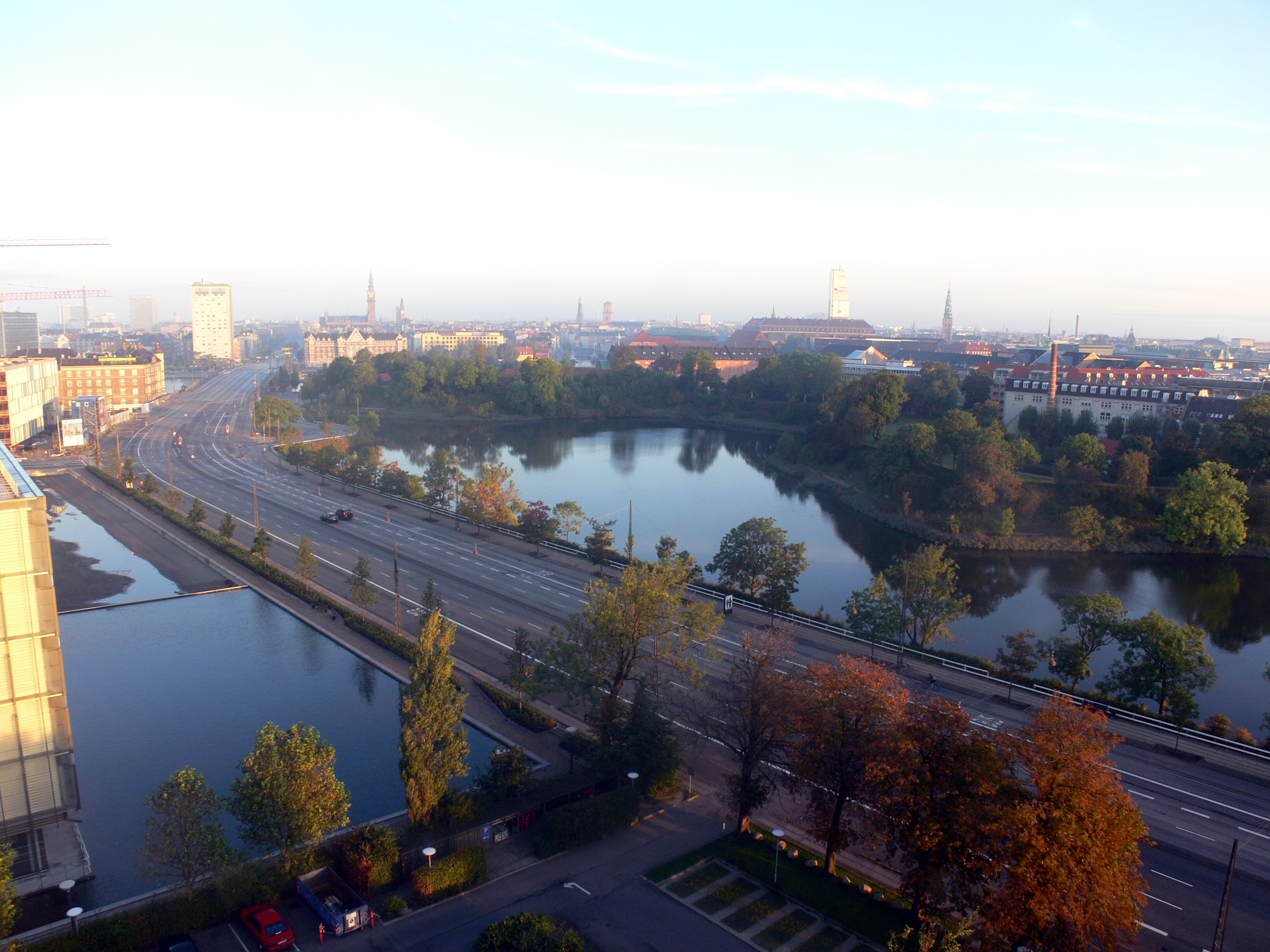 Kopenhagen. Überblick aus dem SAS Radisson Hotel